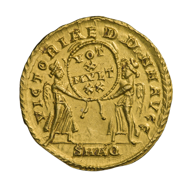 Солид. Констант I. Ок. 340—350 гг. (реверс). Две Виктории стоят напротив друг друга; держат венок с надписью в четыре строки VOT/X/MVLT/XX.